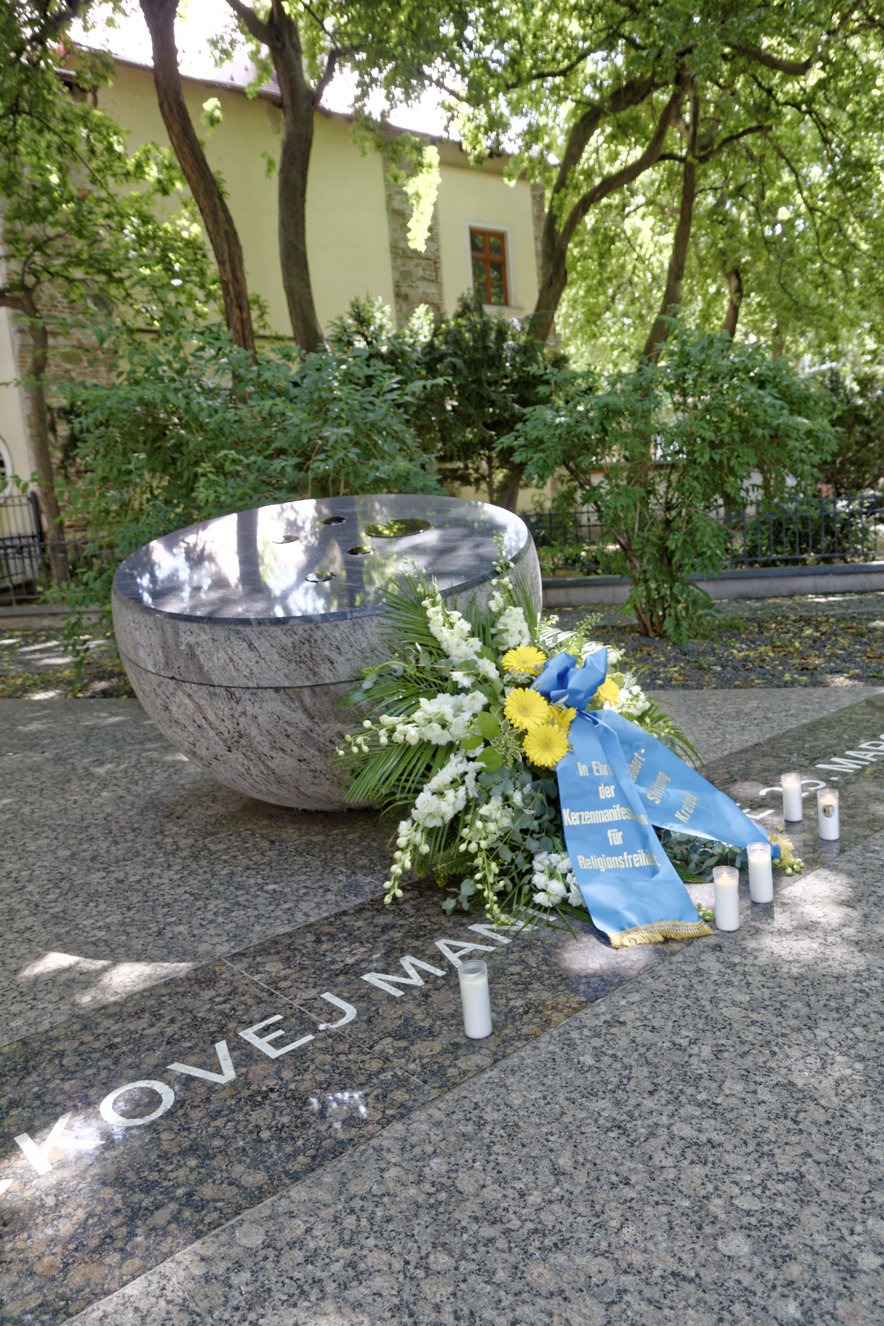 Bratislava; Denkmal der Kerzenmanifestation am 28. März 1988